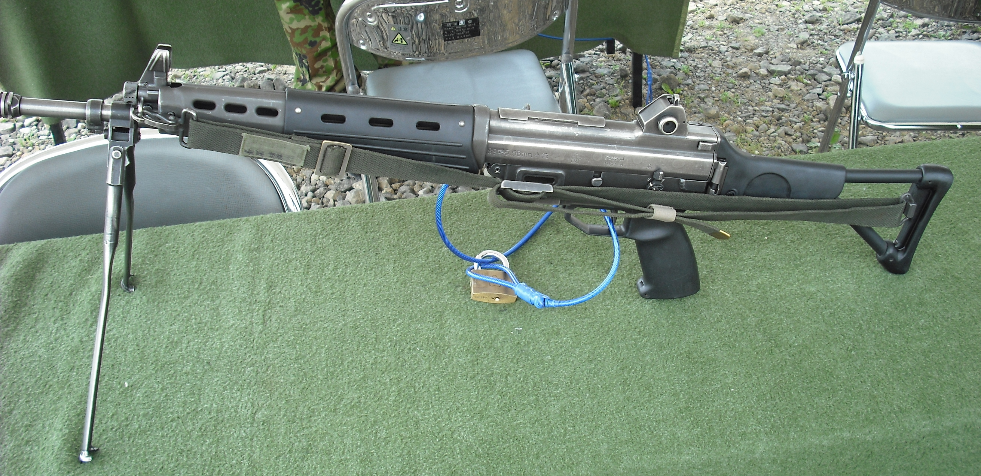 折りたたみ銃床型、刻印は「89式5.56mm小銃」と記載であり、初期型であることが確認出来る